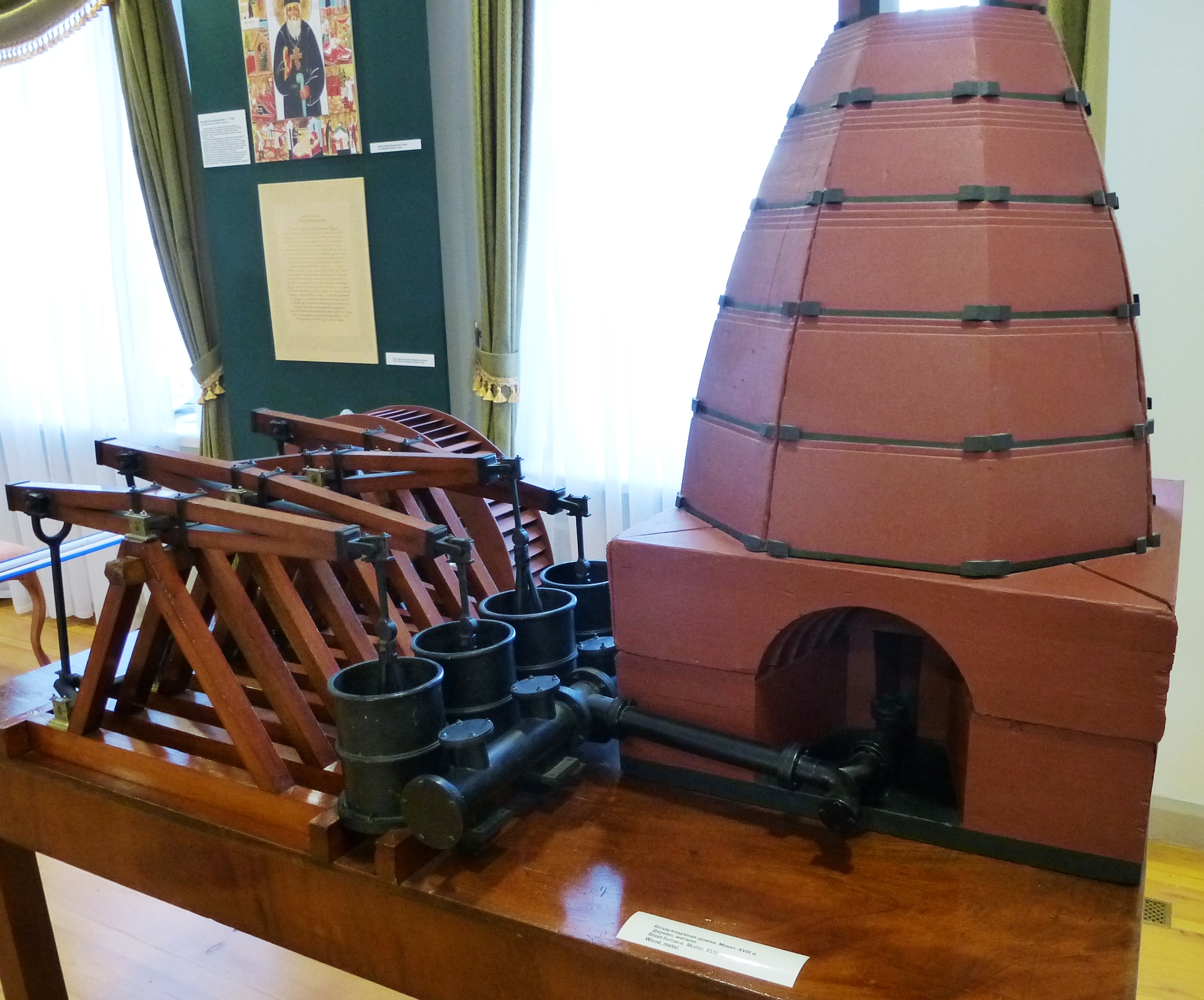 Воздуходувные домны применялись на Олонецких горных заводах для выплавки железа.(источник - Национальный музей Республики Карелия)